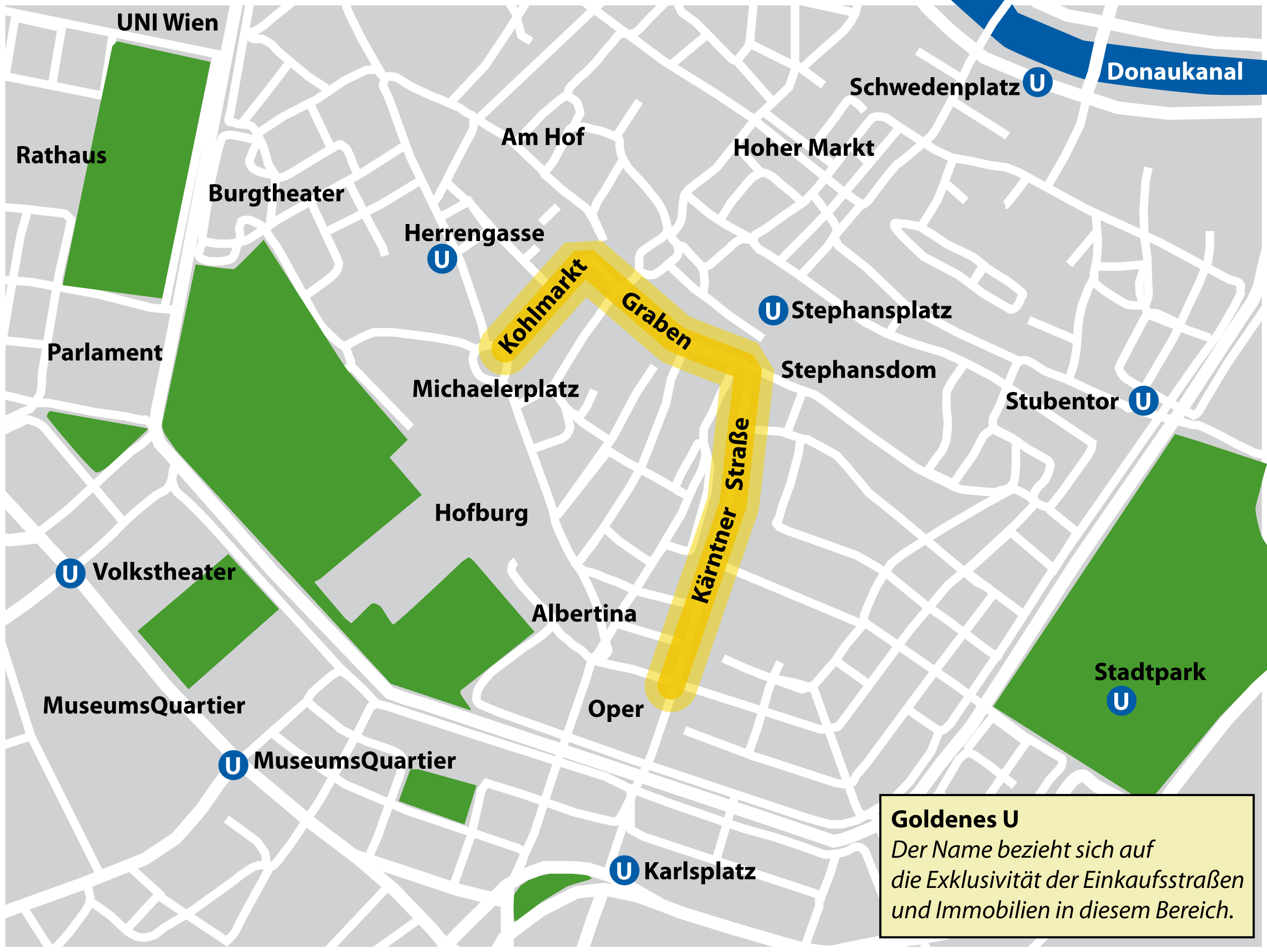 Wien Goldenes U - Kärntner Straße, Graben, Kohlmarkt